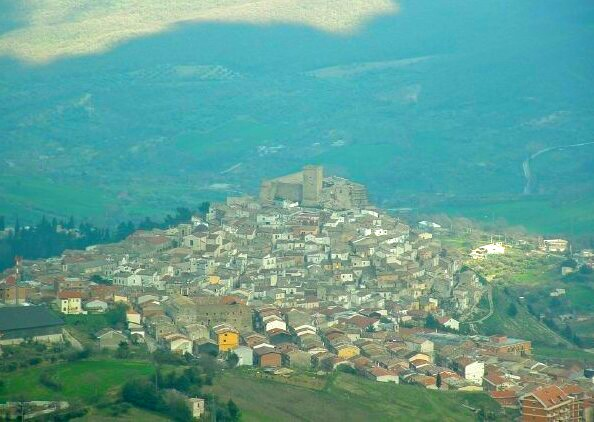 Visione di Deliceto